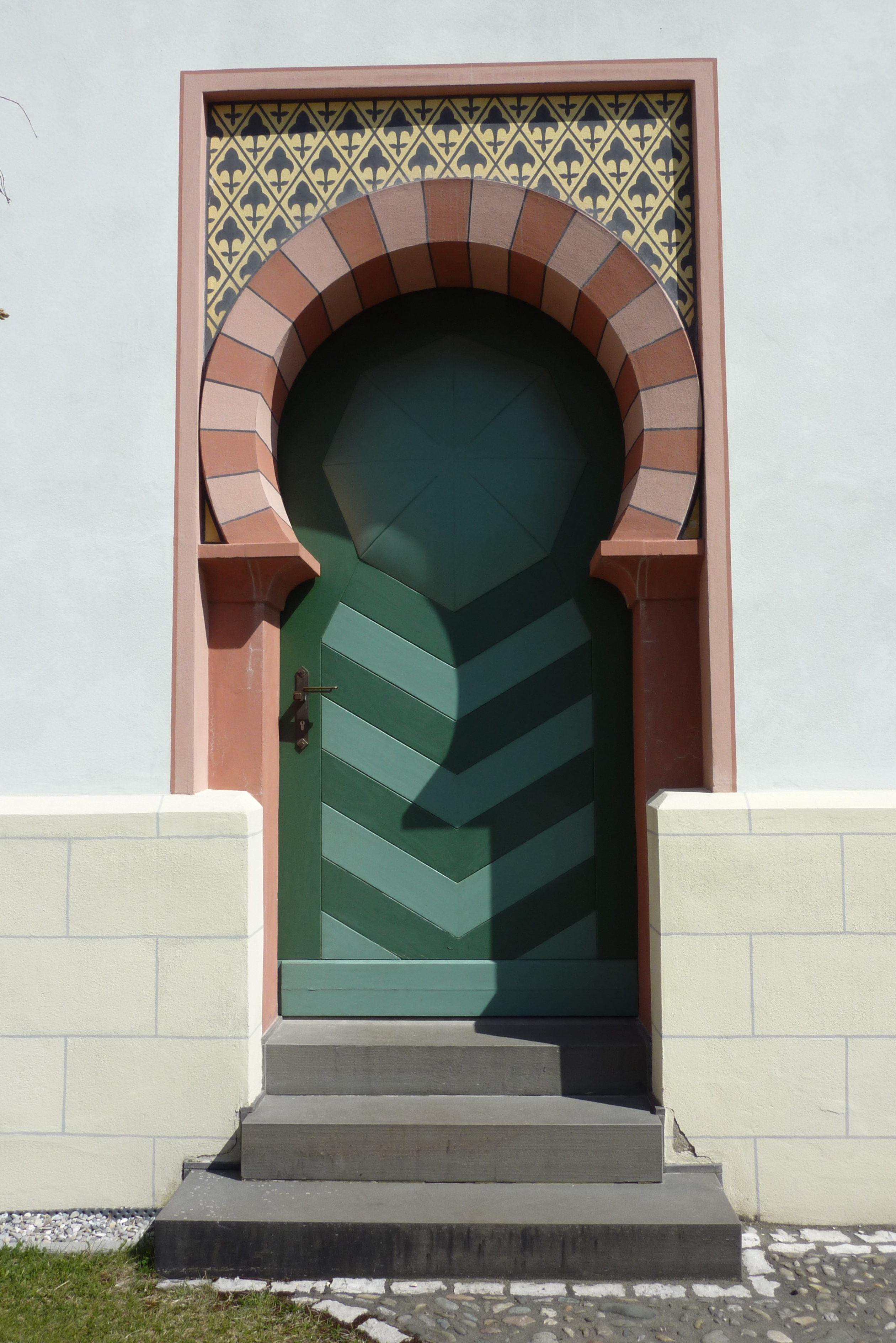 Synagoge in Binswangen, erbaut 1836/37, kleine Tür mit Hufeisenbogen an der Portalfassade